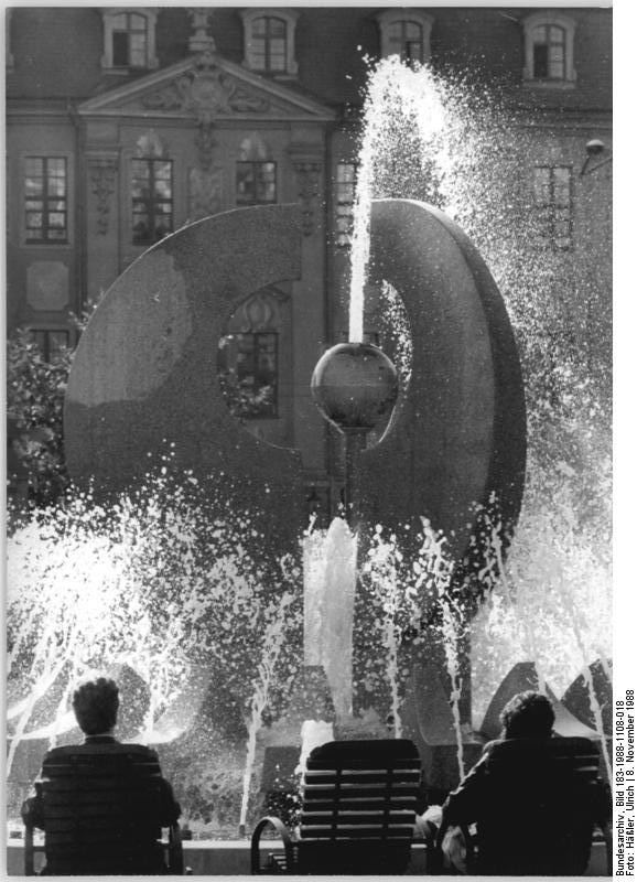 Dresden, Springbrunnen ADN-ZB Häßler 8.11.1988 Dresden: Noch sprudelt der Brunnen am Neustädter Markt. Aber die Herbstsonne wärmt nicht mehr, die ersten leichten Fröste sind schon vorüber. Deshalb werden die Wasserspiele und Brunnen am 12. und 13.11.1988 von den Technikern des VEB Grünanlagen abgestellt. 62 Wasserspiele erfreuen in den Sommermonaten die Einwohner der Elbestadt und Tausende Gäste.